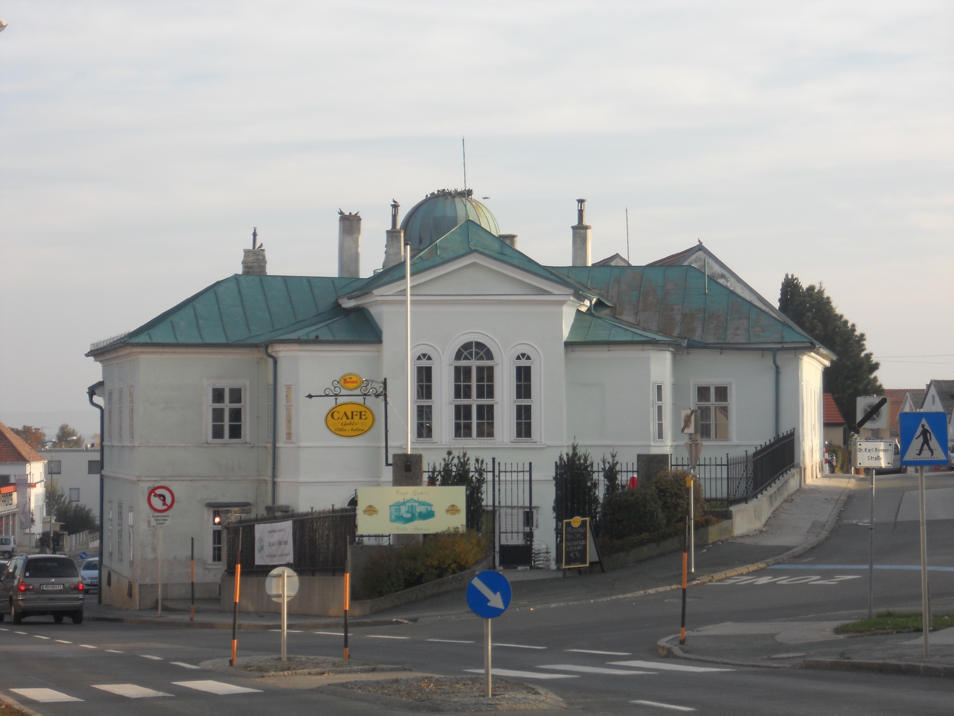 Leinnerhaus/ehem. Landesmuseum mit Einfriedungsmauer